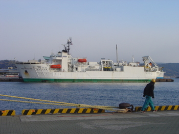 パシフィックリンク